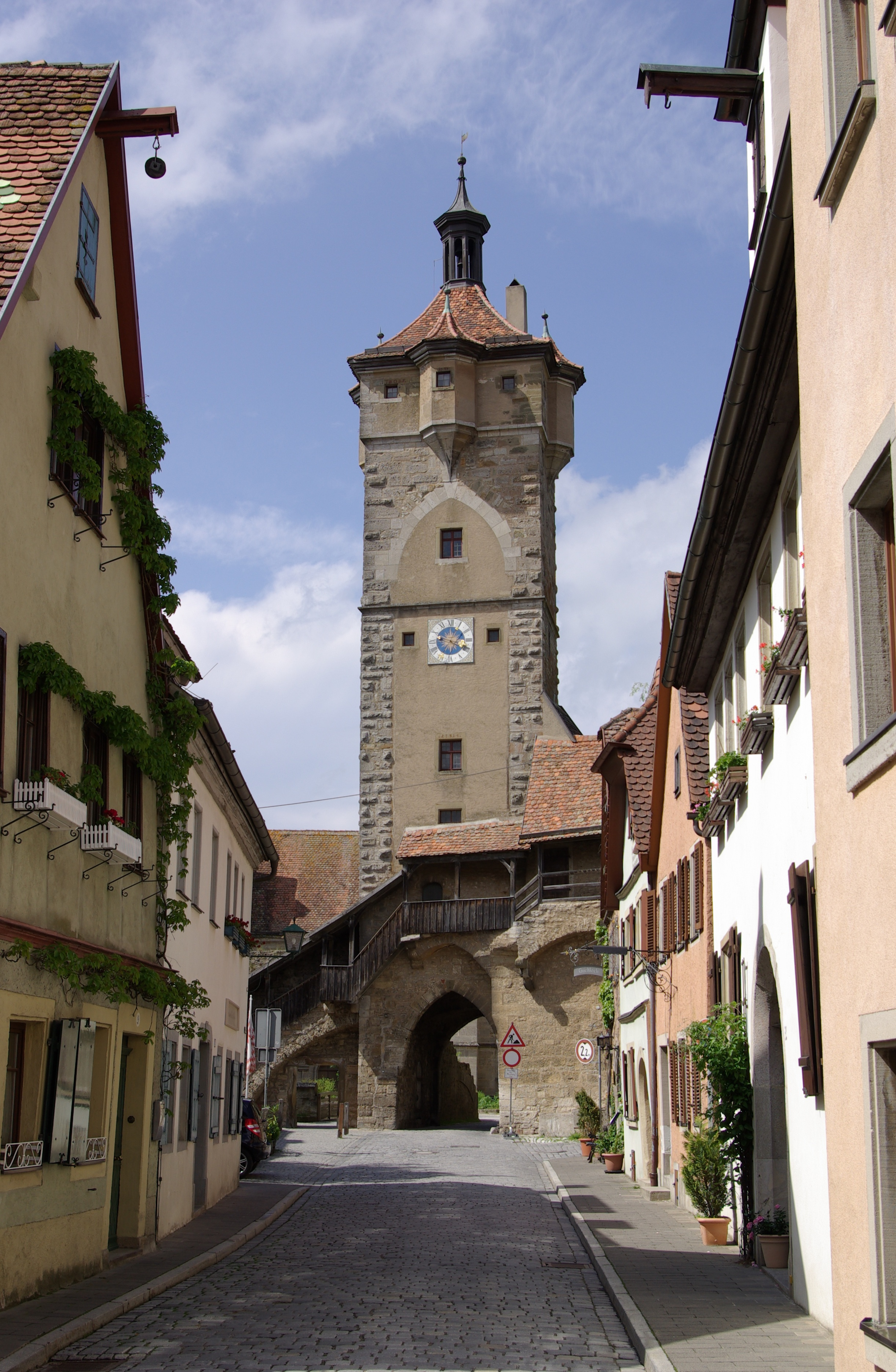 Klingentor in Rothenburg ob der Tauber